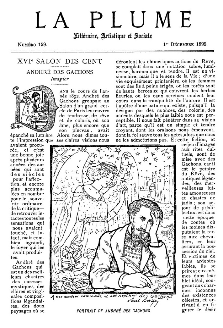 La Plume Salon des cents 1895 Gachons